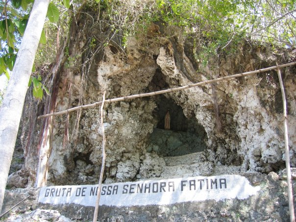 Grotte mit Marienstatue in Osttimor